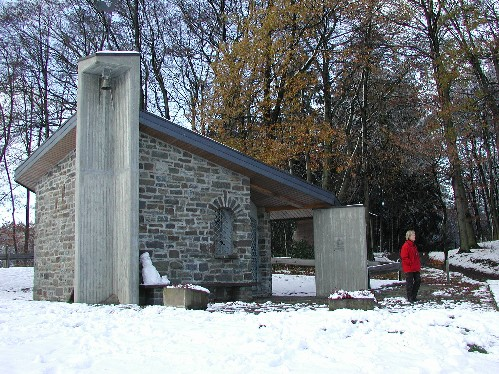 Hubertus-Kapelle in Winkel, Gemeinde Marienheide, Aufnahmedatum: 2004